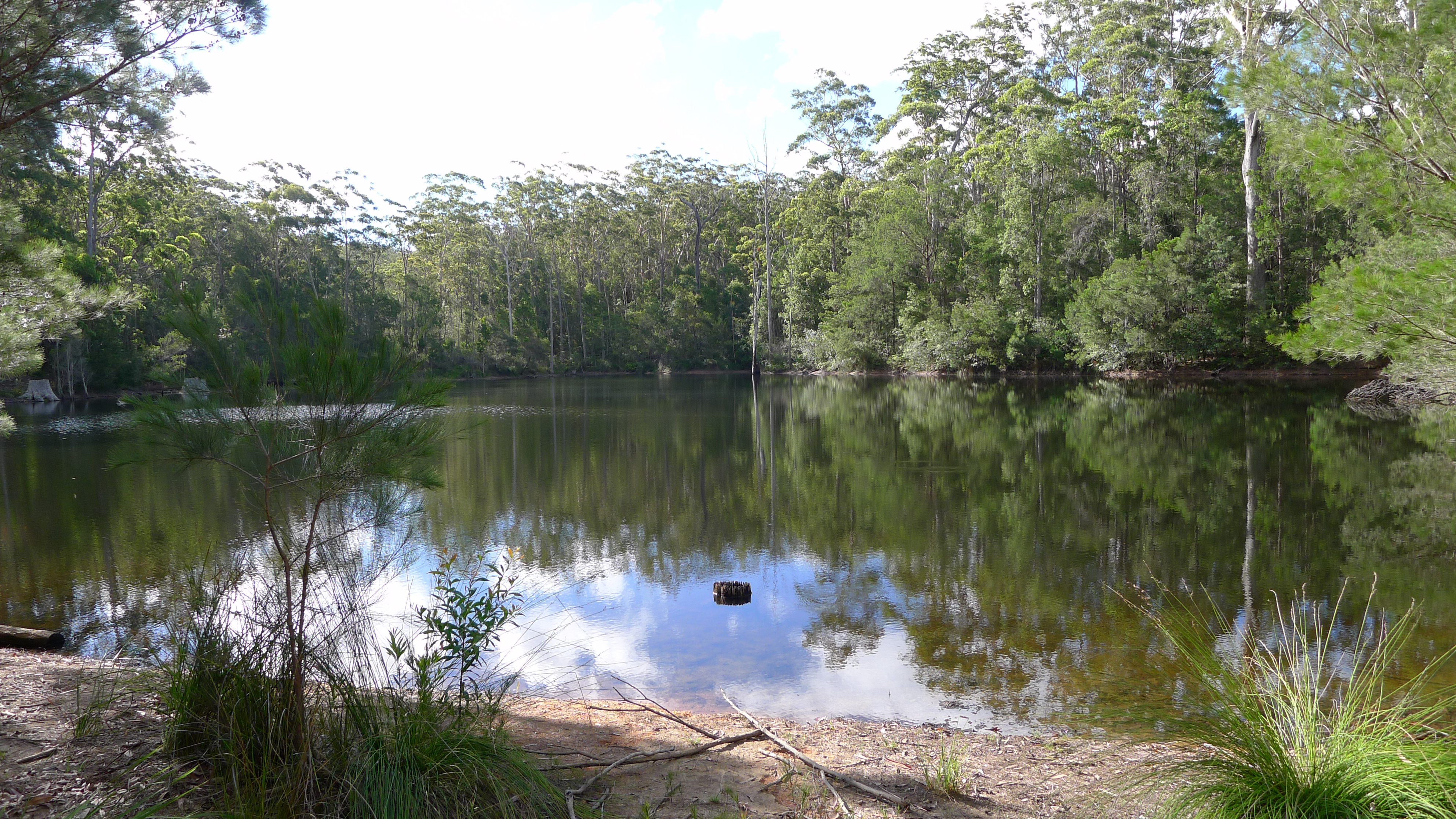 Mount Jerusalem National Park, Koonyum Range, NSW, Australia, December 2014.